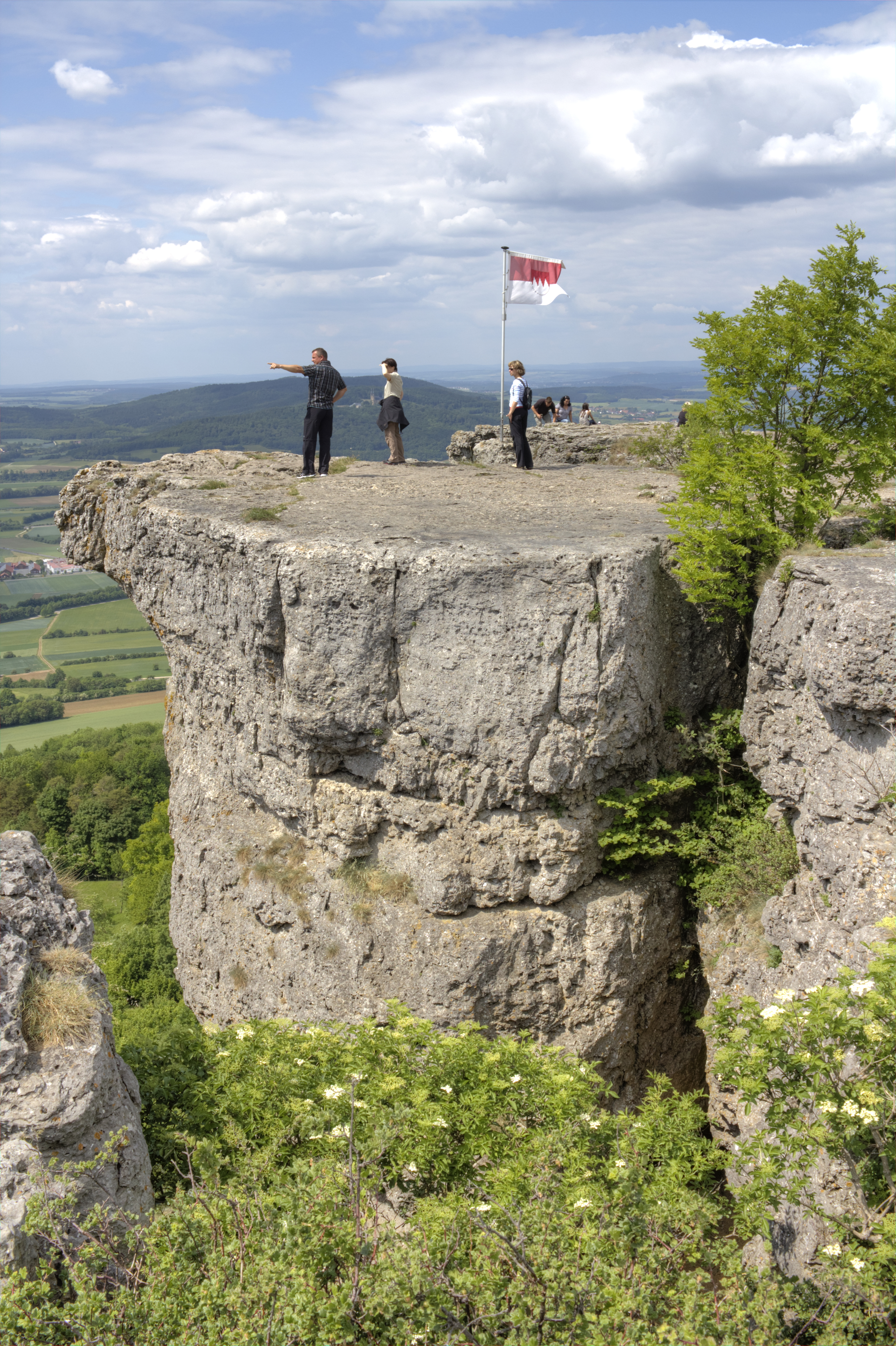 Felsmassiv und Frankenflagge am Staffelberg